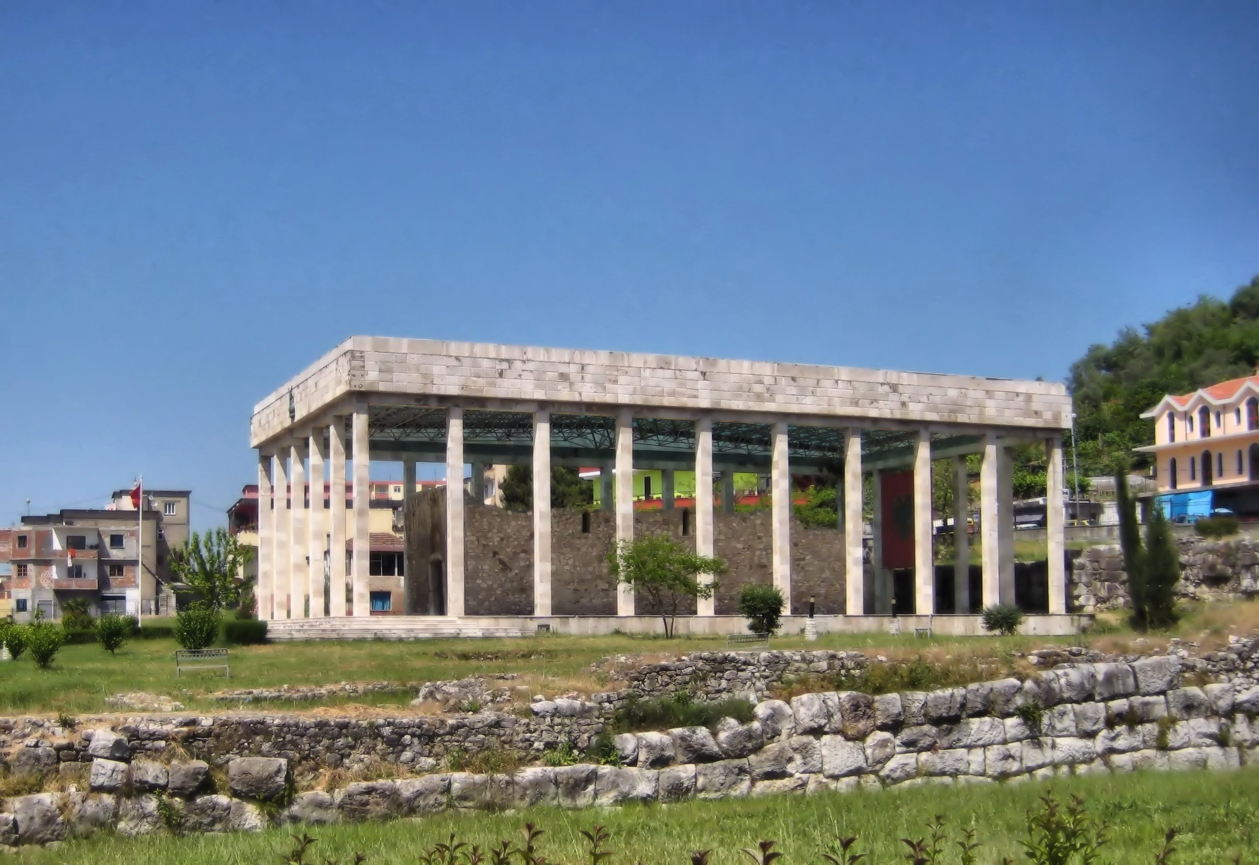 Skanderberg Mausoleum in Lezha, Albanien